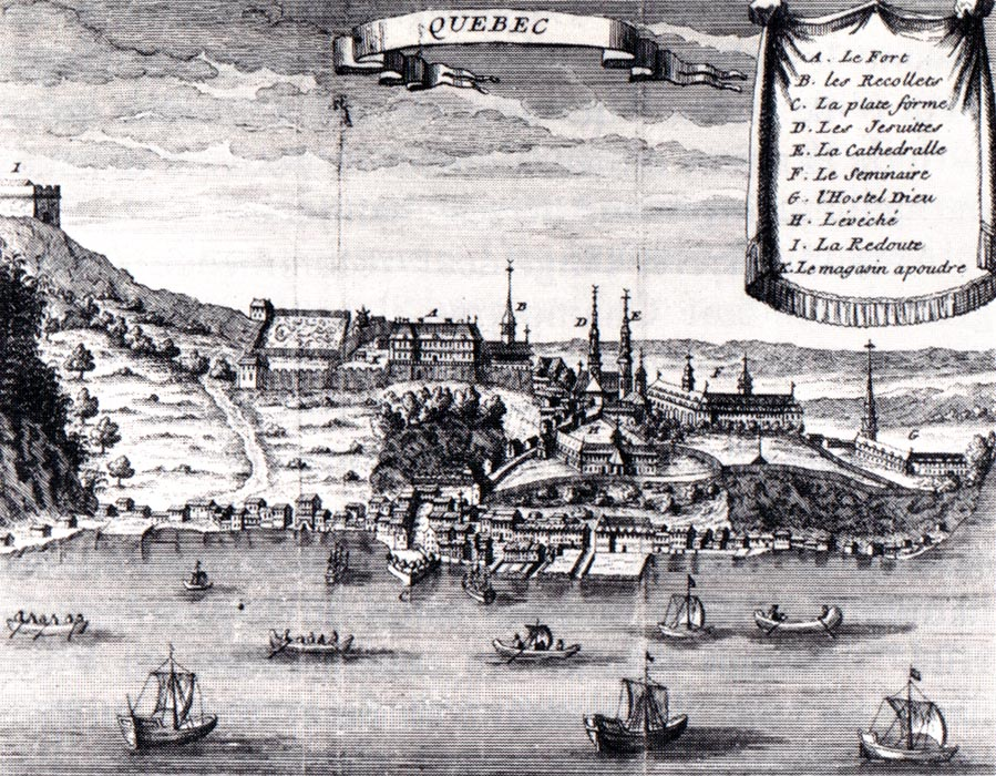 La ville de Québec en 1700, gravure anonyme.